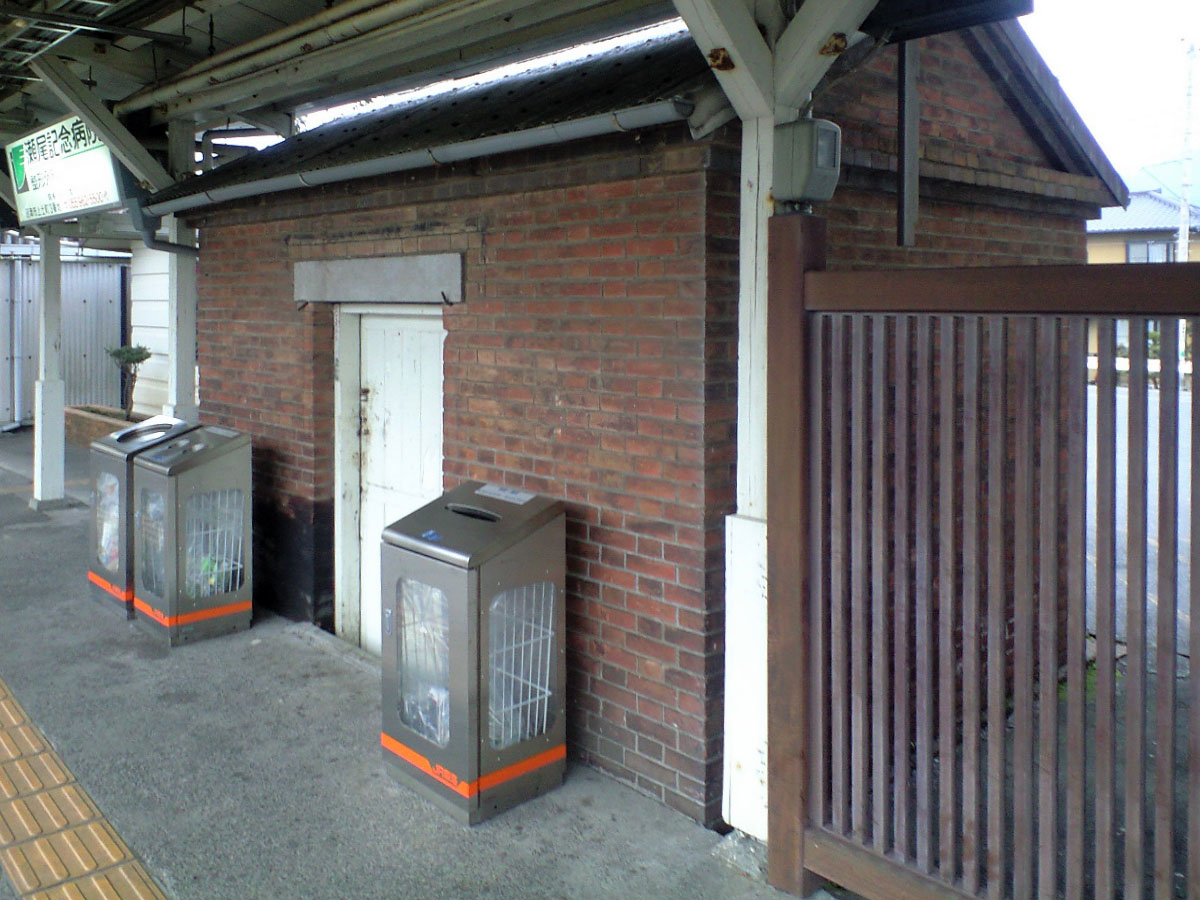 静岡県沼津市原、JR東海 原駅 ランプ小屋（1900年（明治33年）？）